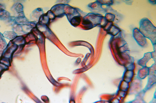 Eingesenkte Spaltöffnung mit Haarzellen beim Oleander (Nerium),Durchlichtmikroskop,100fach